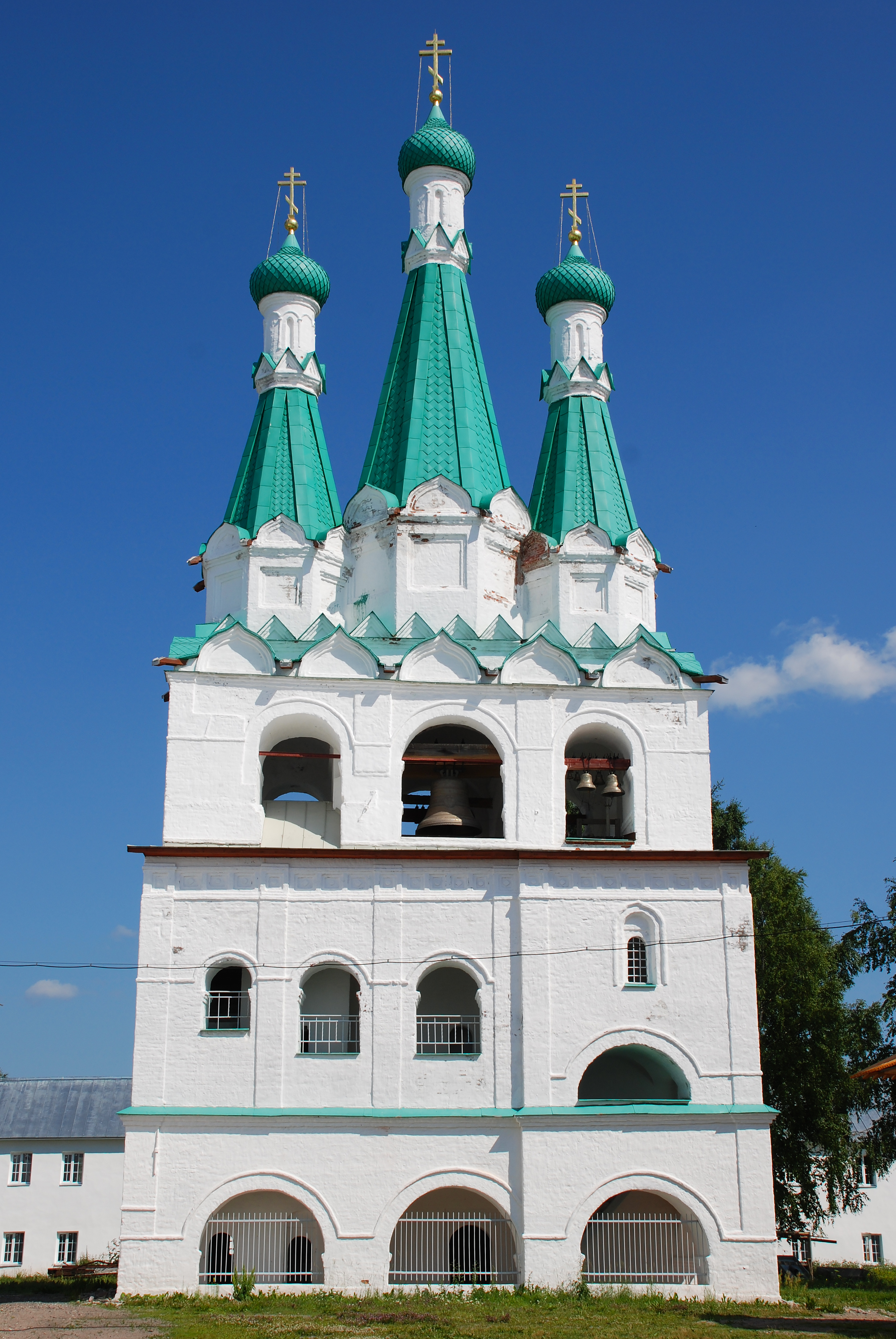 Звонница: Старая Слобода, Лодейнопольский район, Ленинградская область